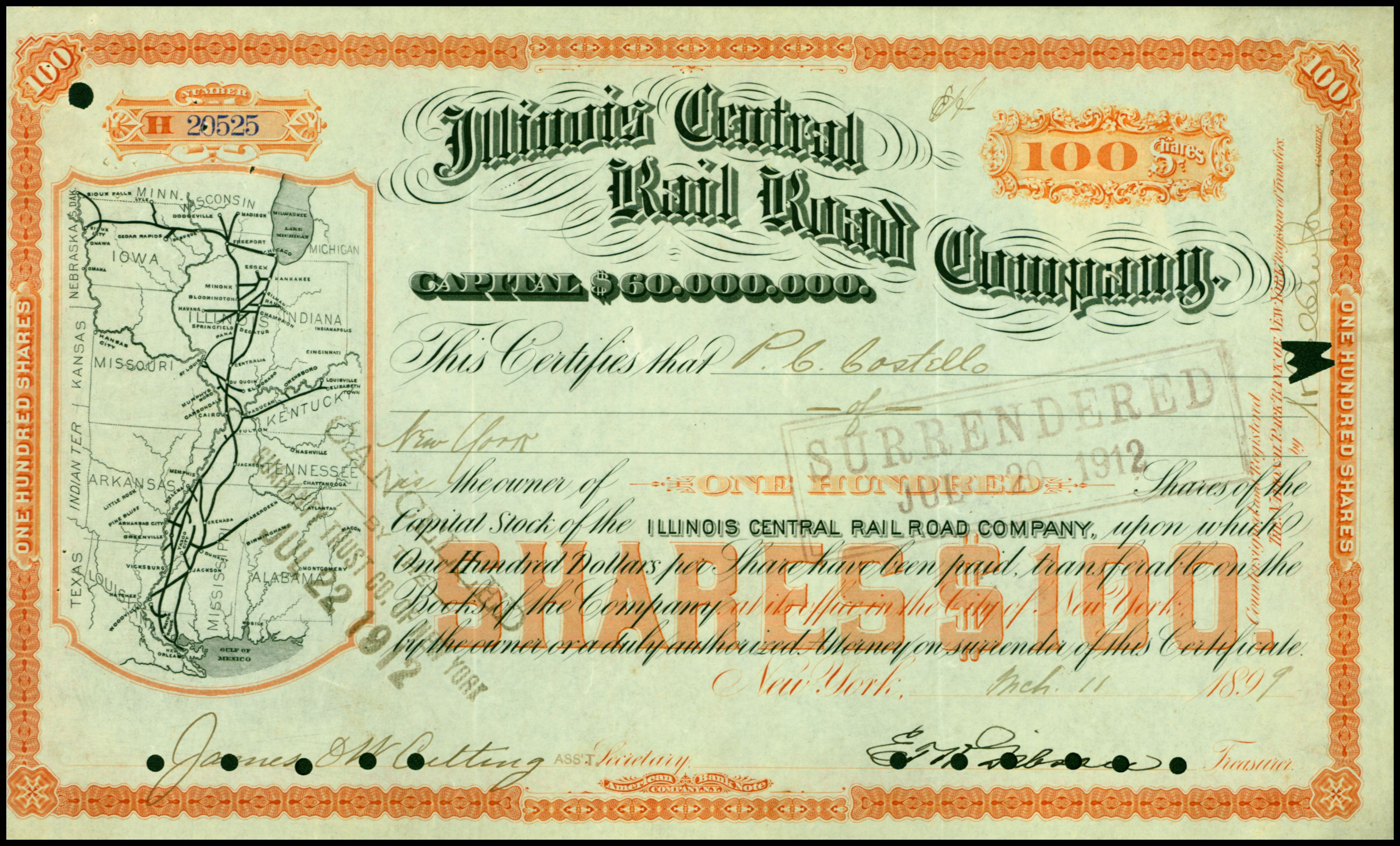 Aktie der Illinois Central Rail Road Company von 1899; aus dem Fundus des Ersten Deutschen Historic-Actien-Museum e.V. (EDHAM), Kürnbach